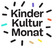 KinderKulturMonat